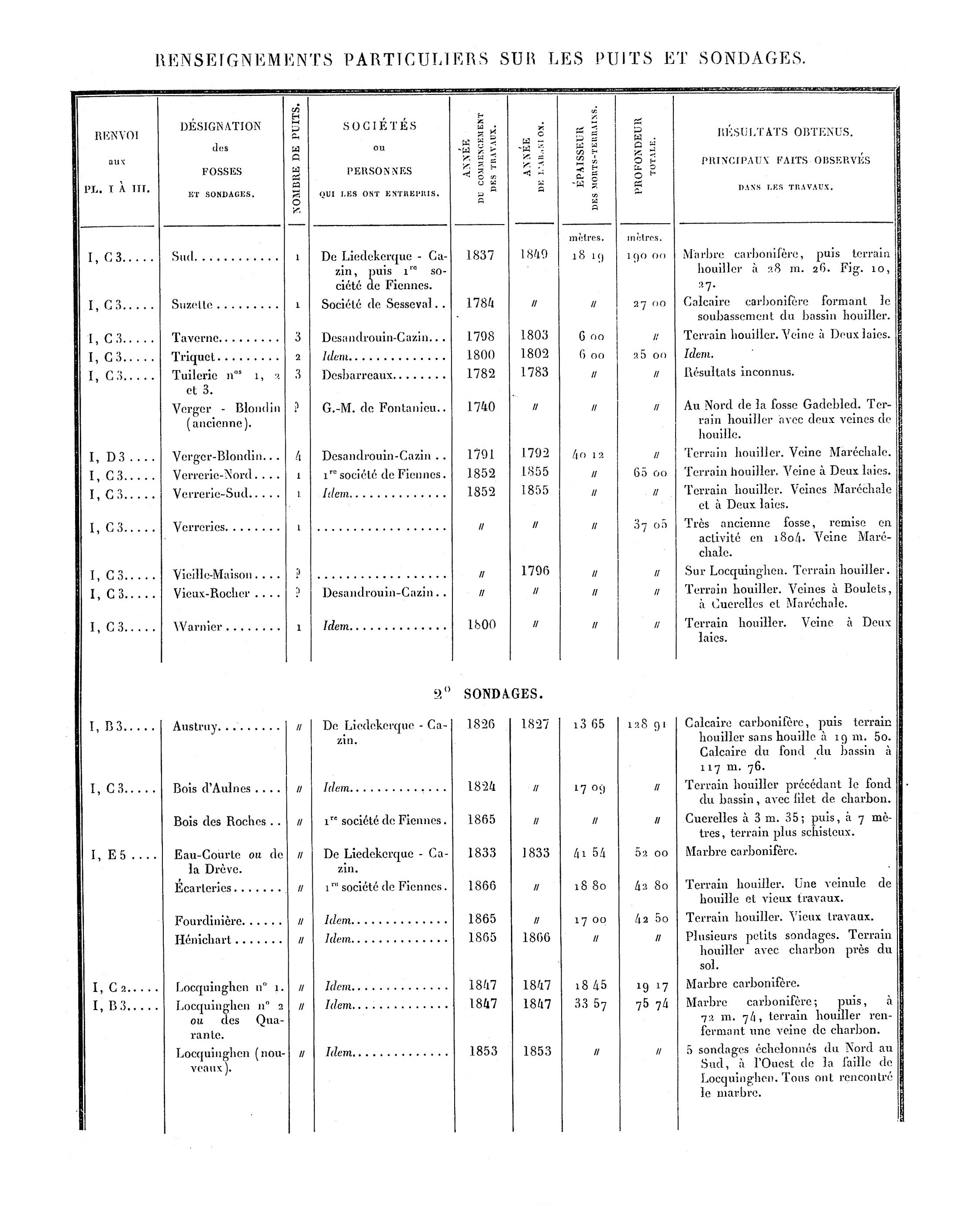 Liste des puits de mine et des sondages. Mines du Boulonnais. Document extrait de Étude des Gîtes Minéraux de la France. Topographie Souterraine du Bassin Houiller du Boulonnais ou Bassin d'Hardinghen, par A. Olry, ingénieur en chef des Mines. Chapitre IX, pages 172 à 189.